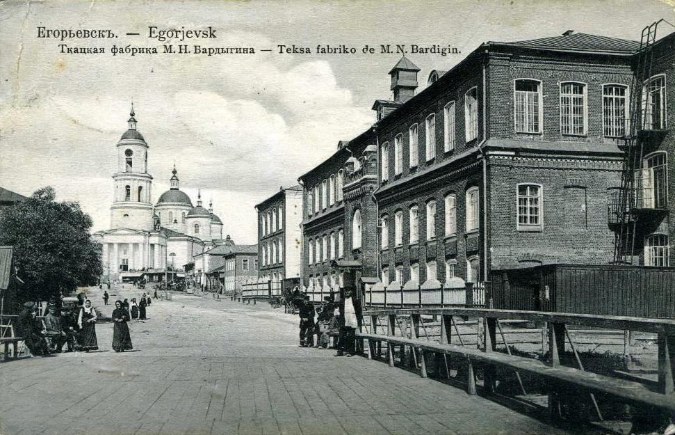 Егорьевск. Ткацкая фабрика М. Н. Бардыгина